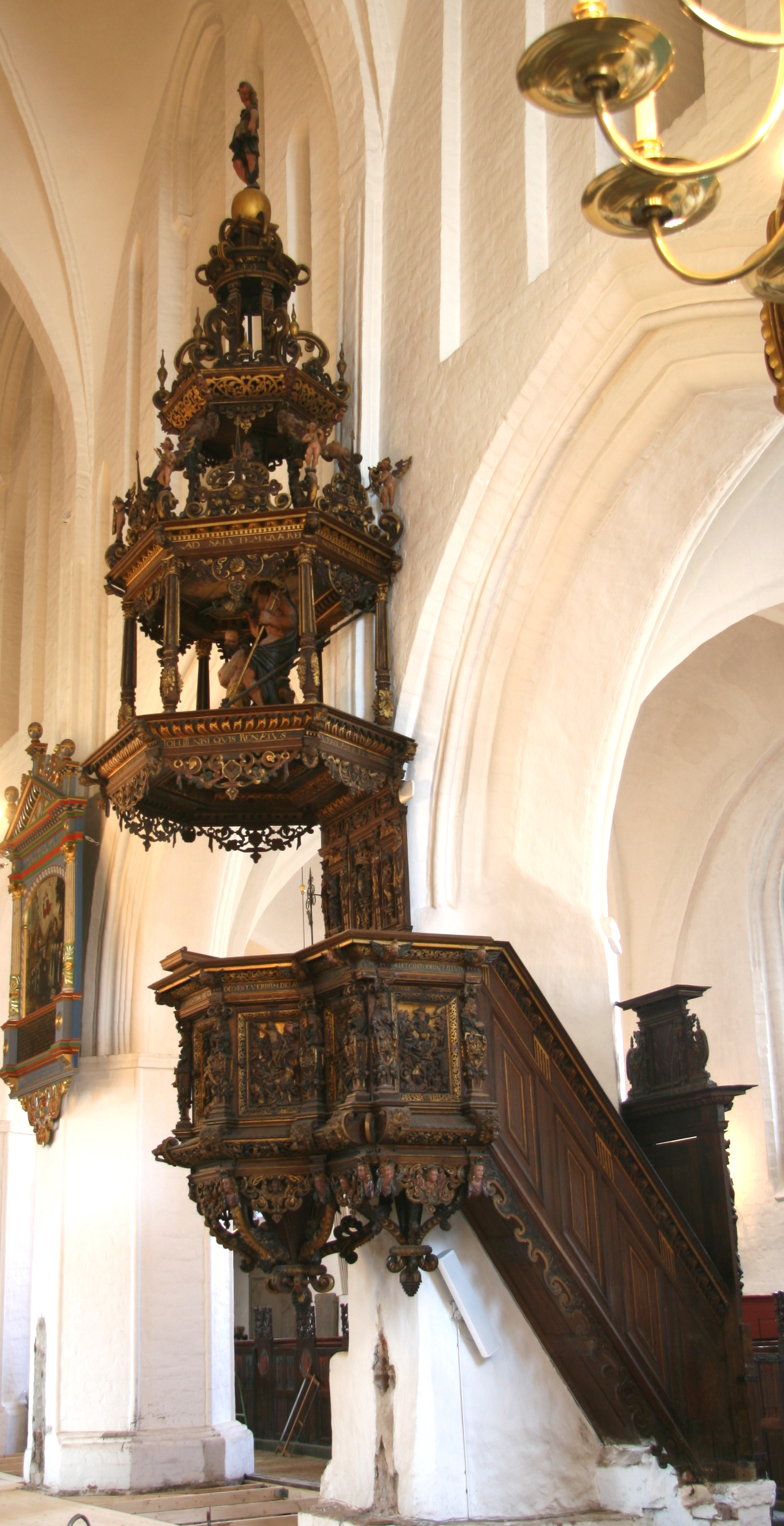 Sankt Nicolai Kirke, Køge, Denmark (Køge Kirke). Pulpit.